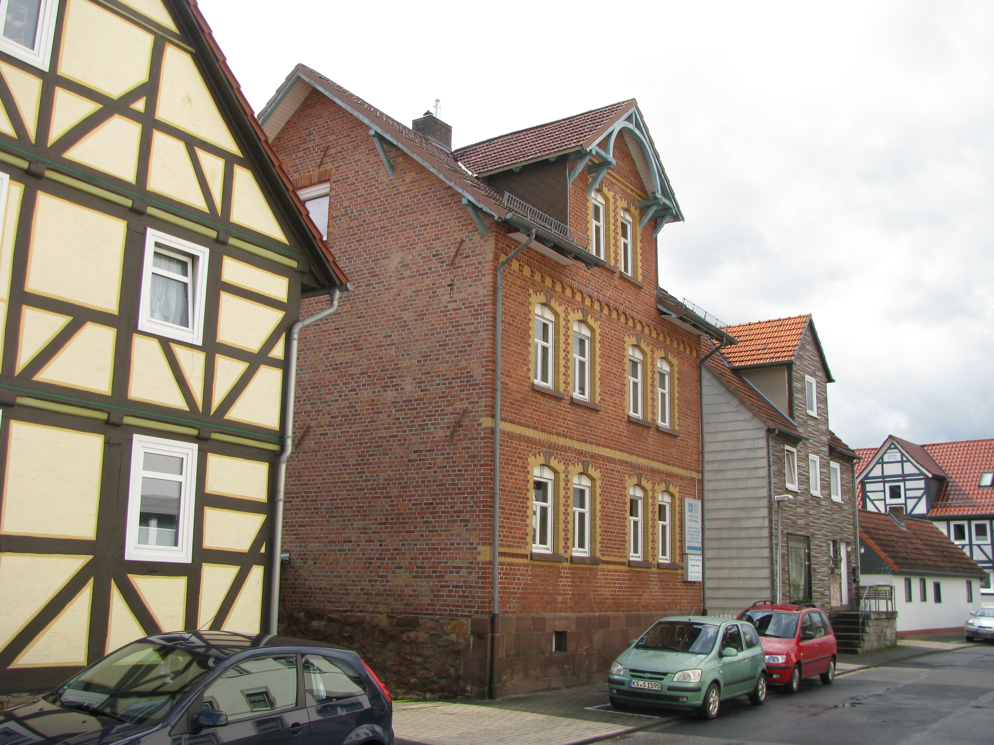 das Haus Kasseler Straße 27 in Fuldabrück-Bergshausen von Südosten